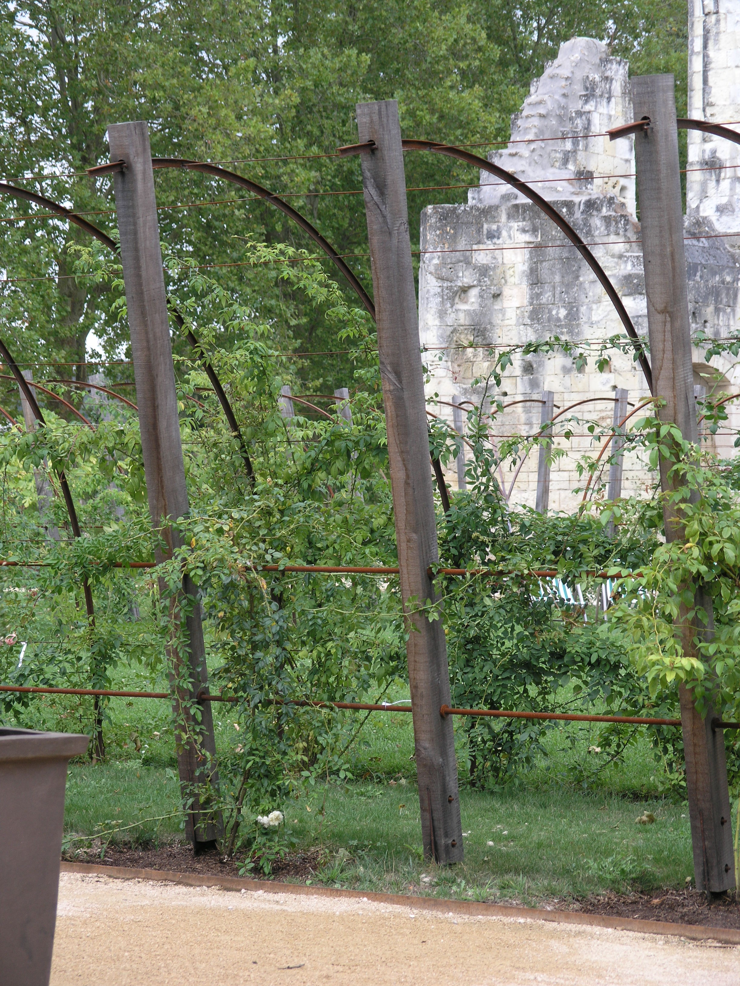 Elemente des 2010 renovierten Gartens im Innenhof der Prieuré